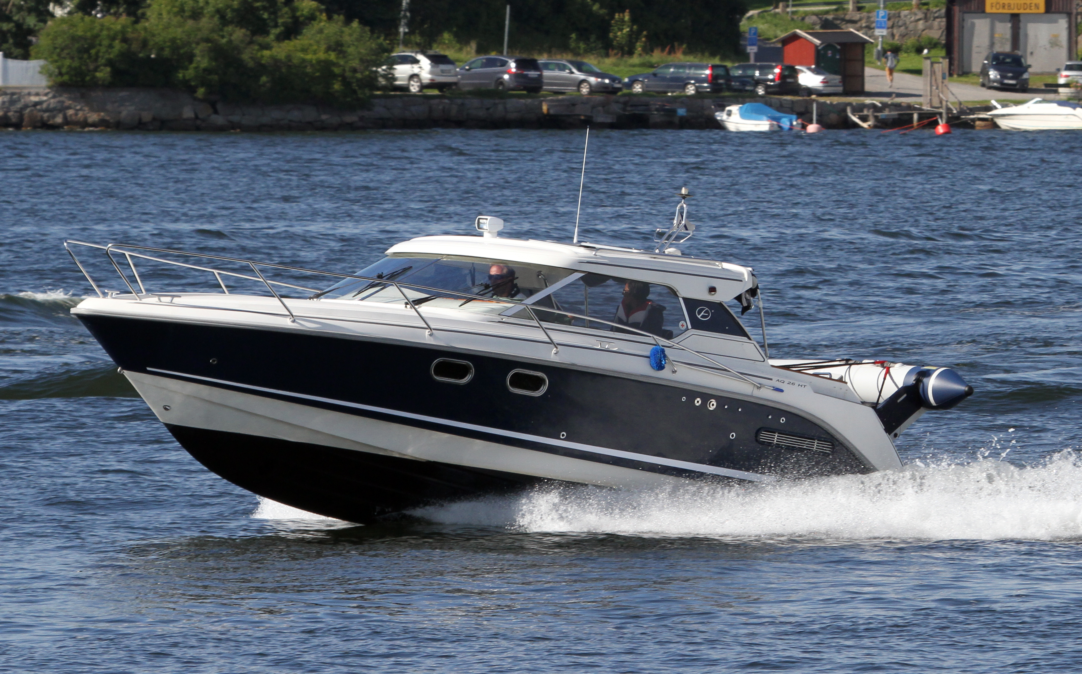 Aquador 26 HT på Södra Vaxholmsfjärden, Vaxholm 4 augusti 2015